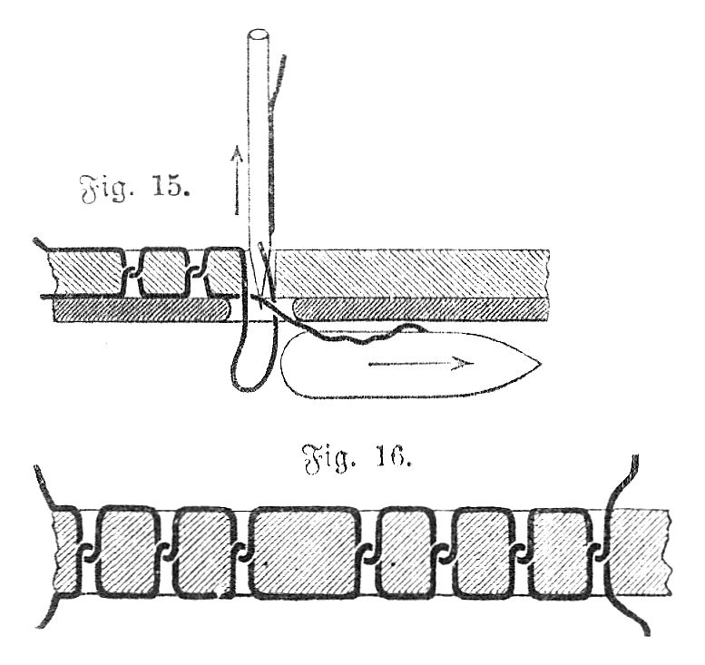 Doppelsteppstich mit zwei Fäden